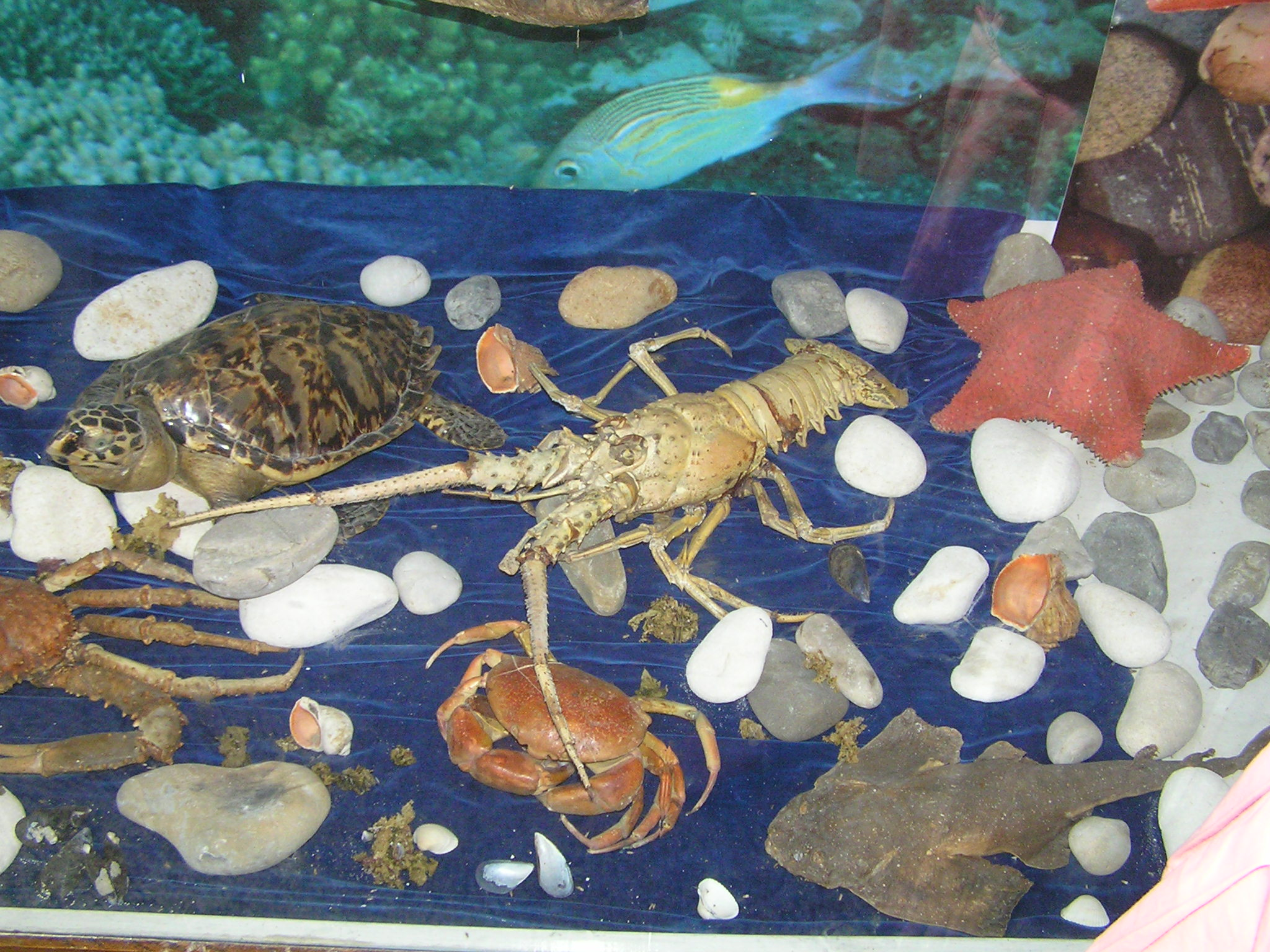 Varna Aquarium, Exposition